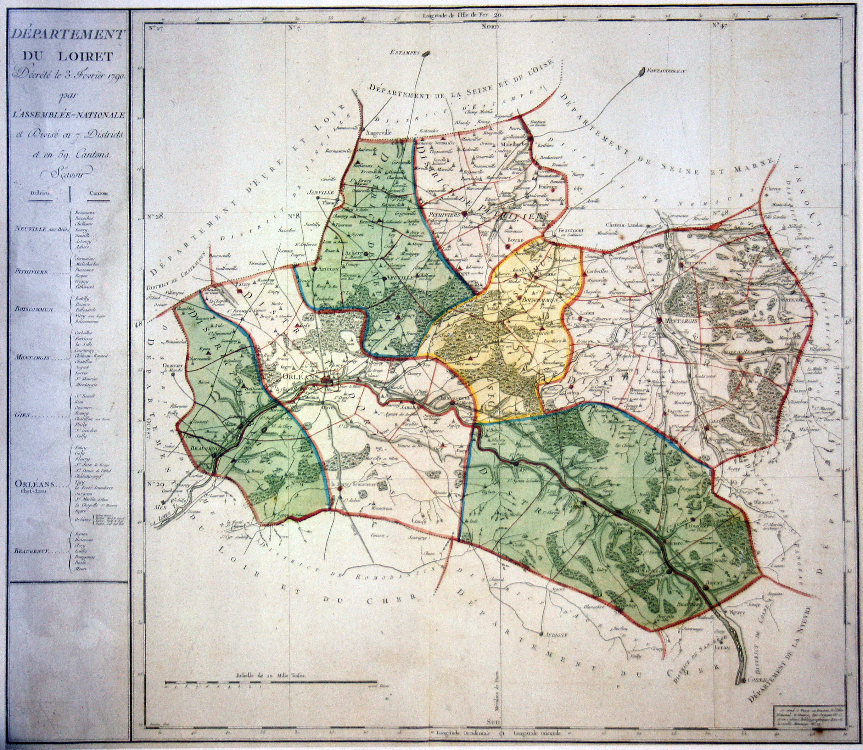 Carte du département du Loiret, issue du décret du 7 février 1790.